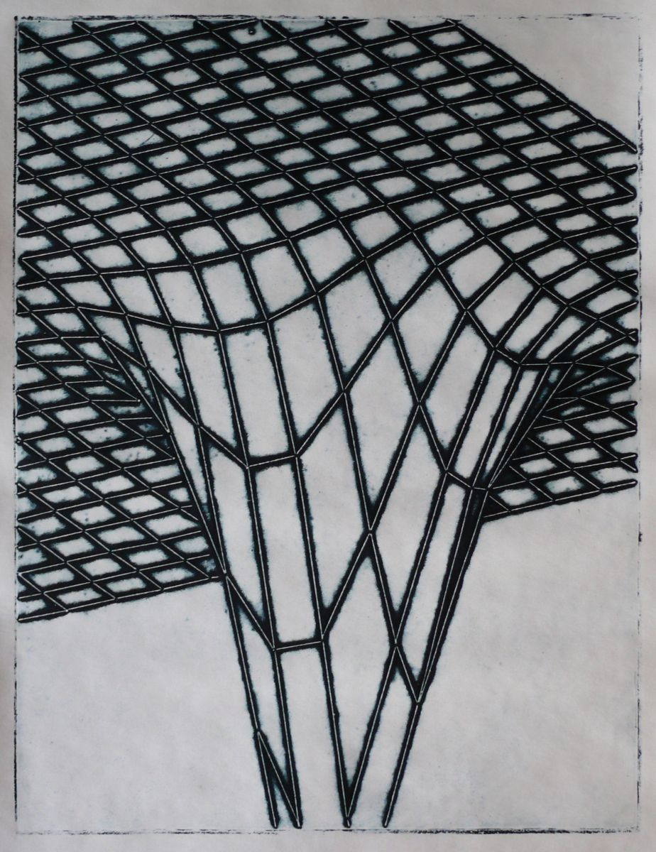 Lubomír Přibyl, HROT, kolografie 2016